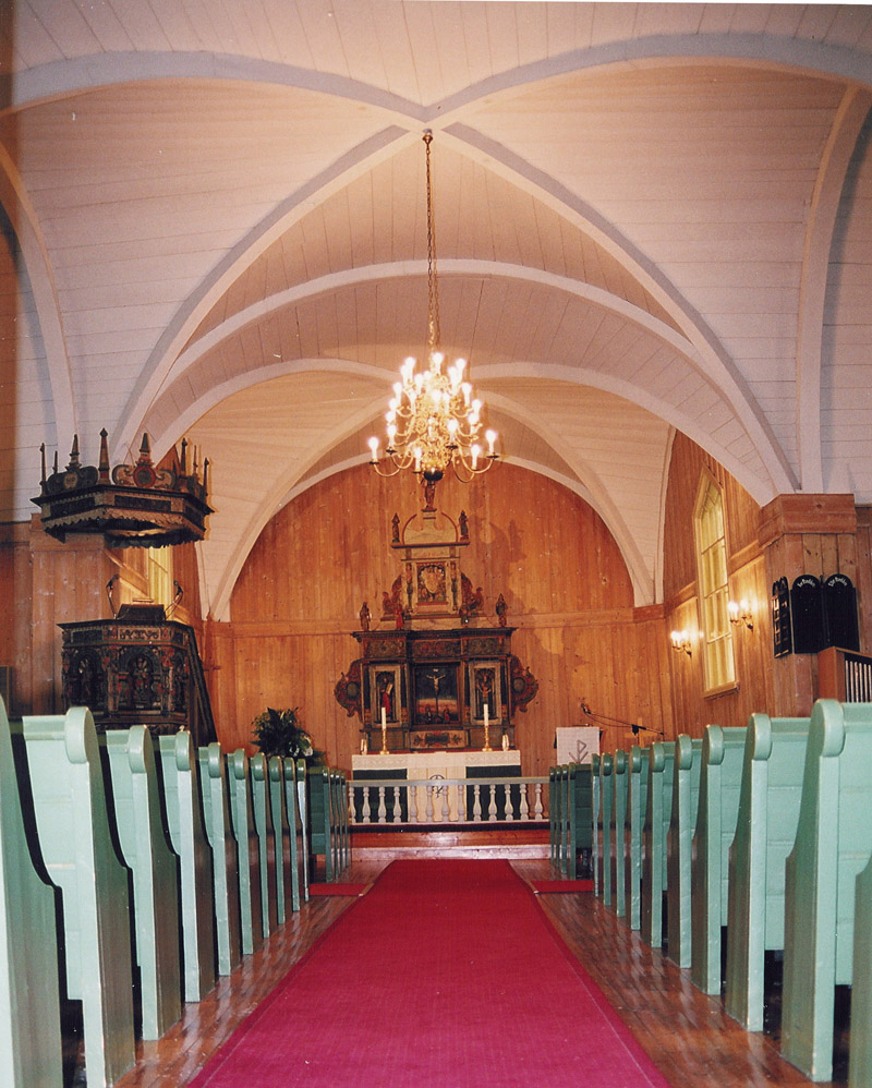 Interiør i Brandval kirke, Norway